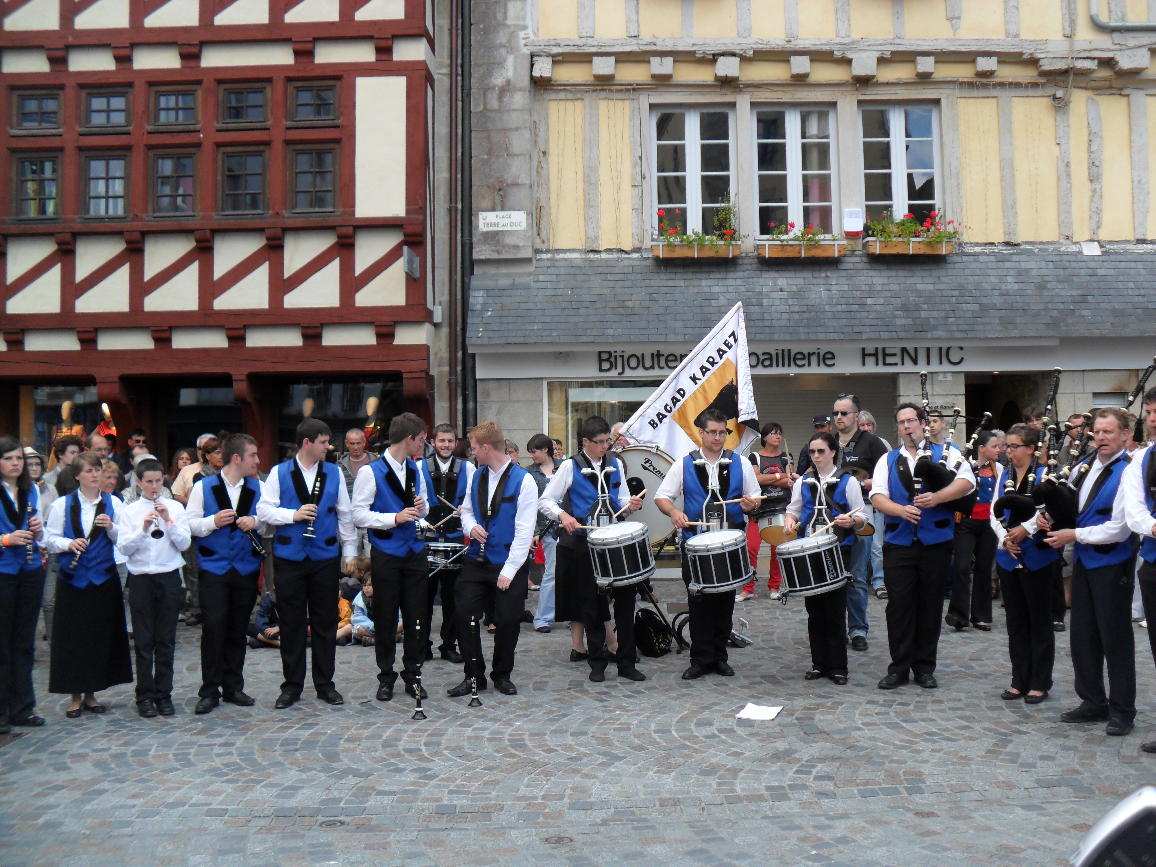 Bagad Karaez pendant le festival de cornouaille à Quimper (France), 2012